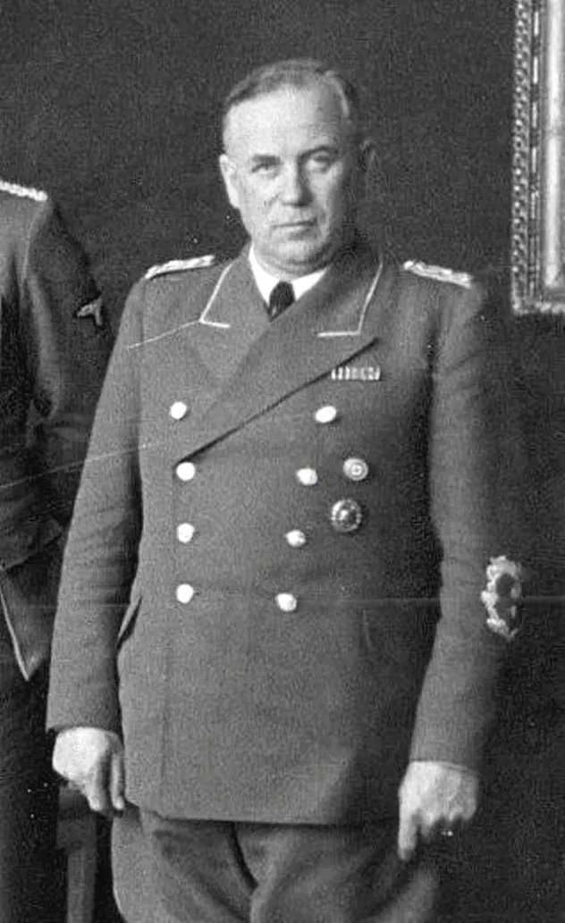 pierwszy Stadthauptmann Krakowa